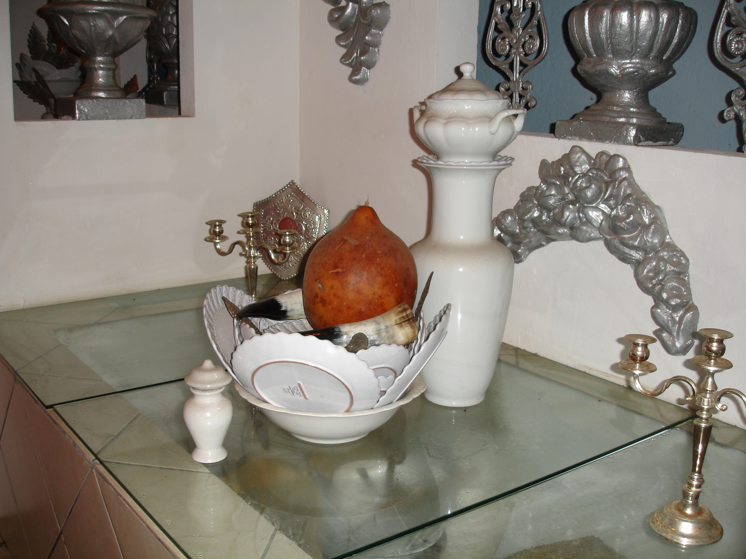 Acentos de Oya Ygbale, Candomblé